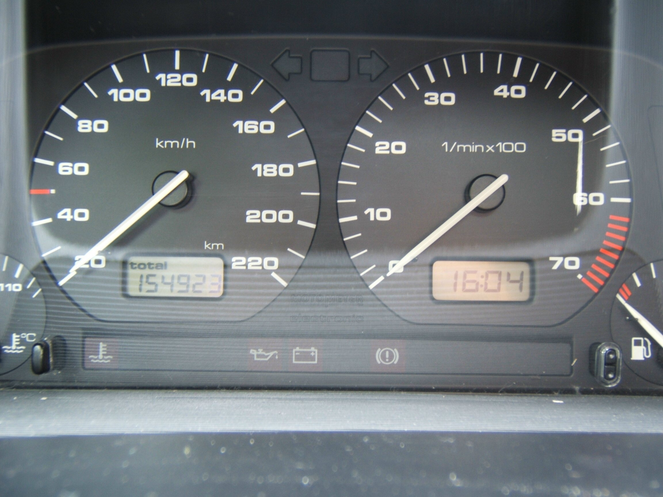 Dasboard van Golf III 1.8 GL Variant